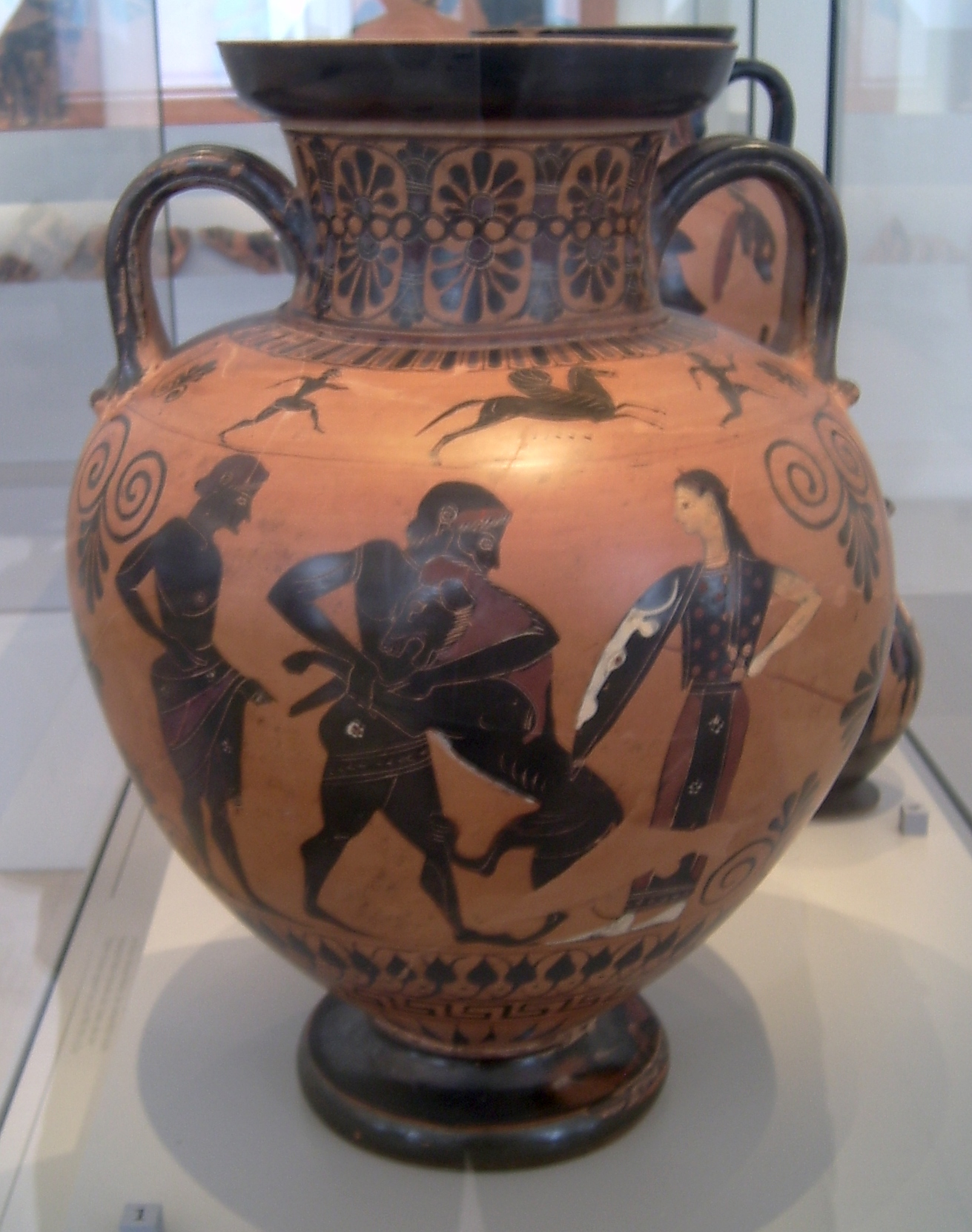 Amphora aus dem Umkreis der Gruppe E, um 540-530 v. Chr.